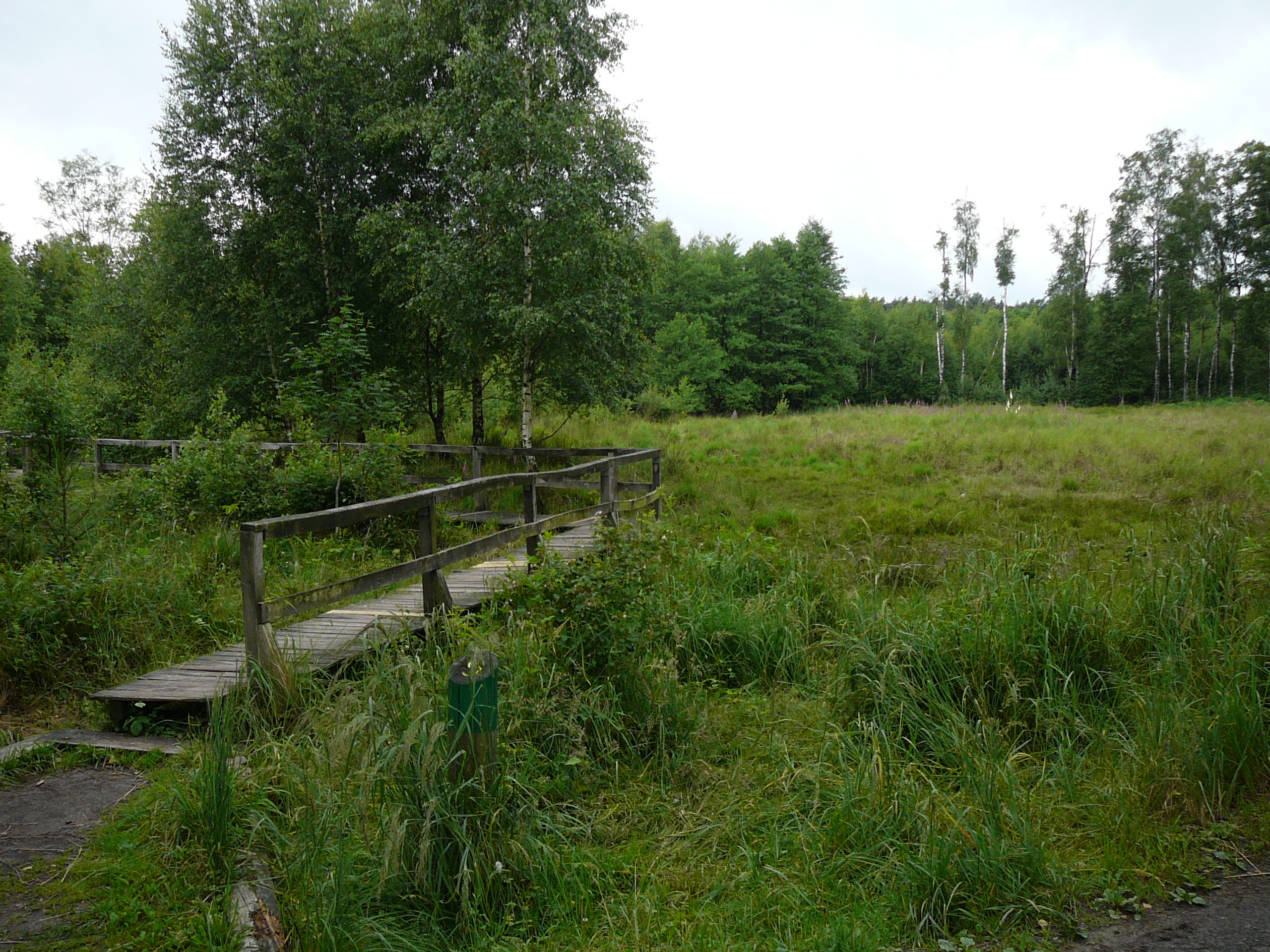 Ohligser Heide, Solingen